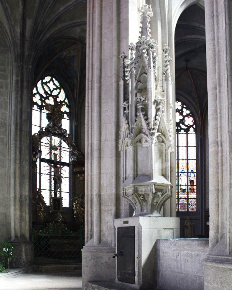 Костёл Святого Варфоломея в Колине